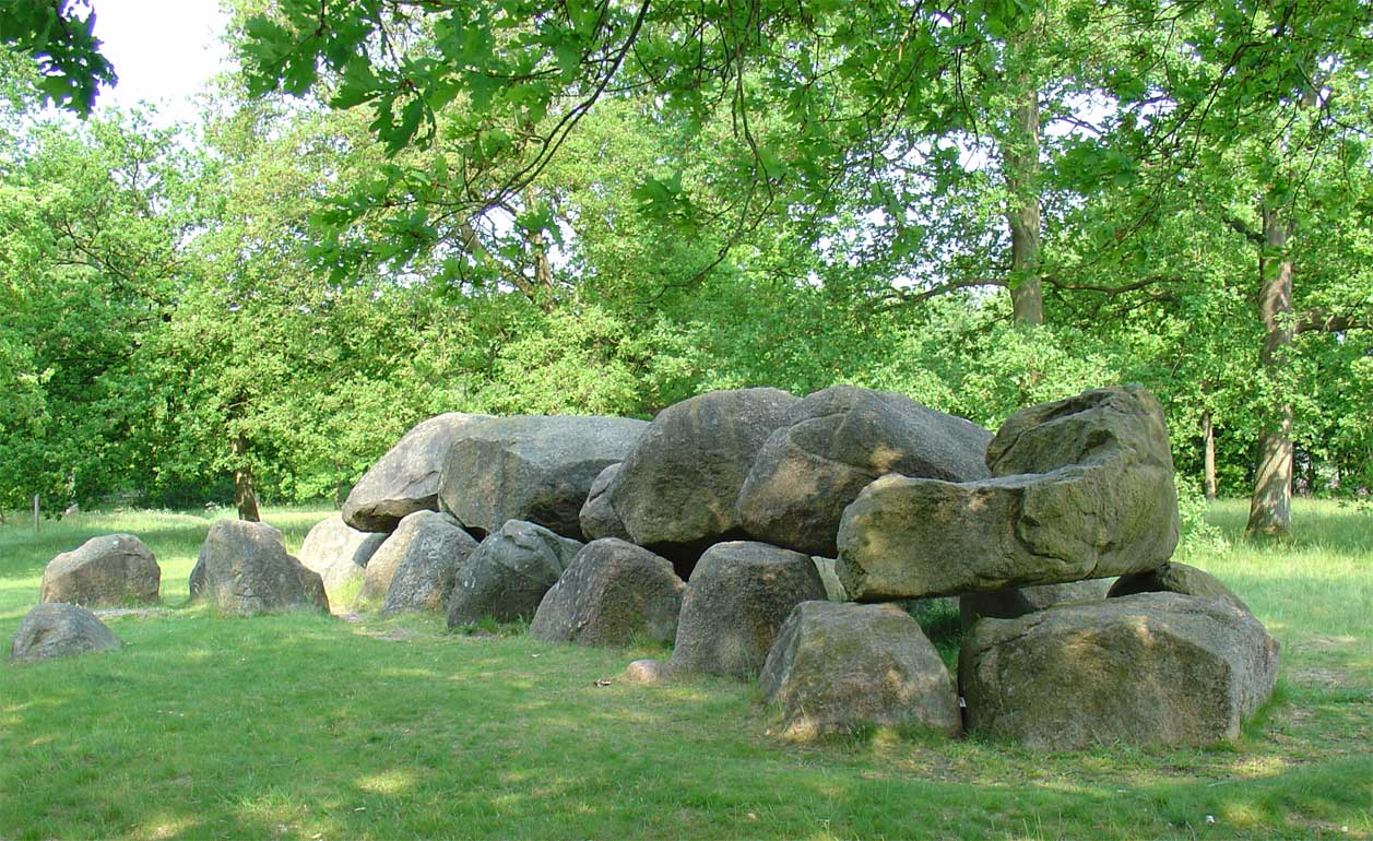 Hunebed D14 bij Eexterhalte